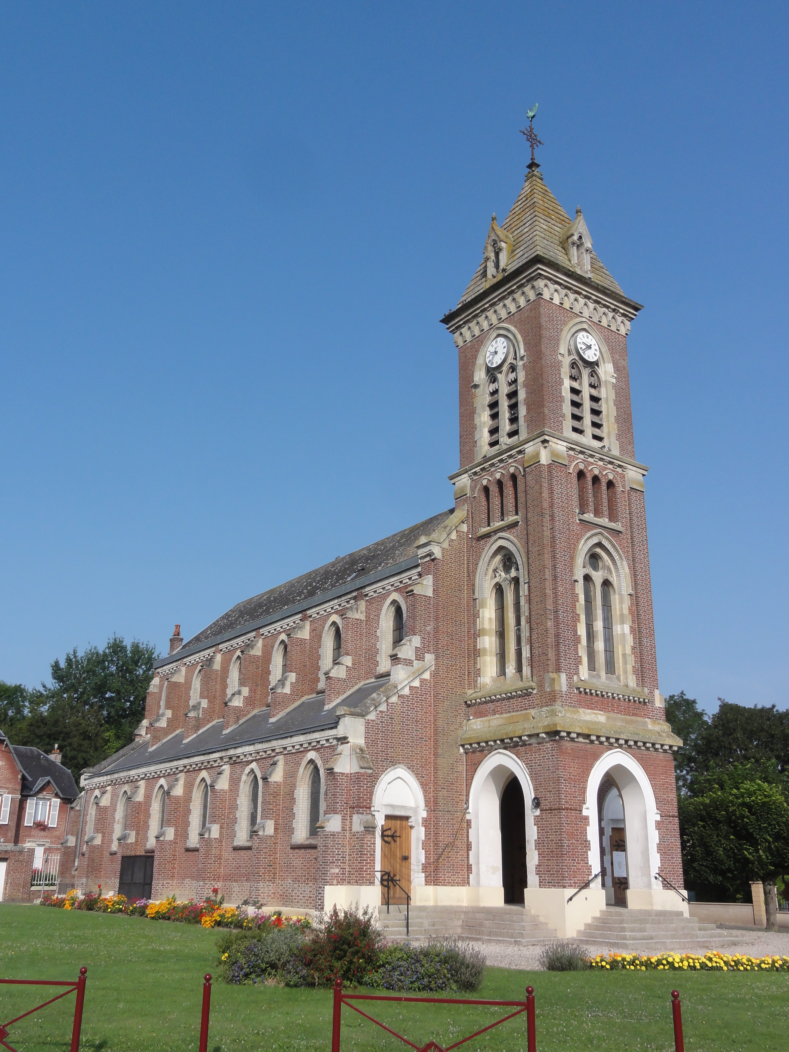 Gricourt (Aisne) église